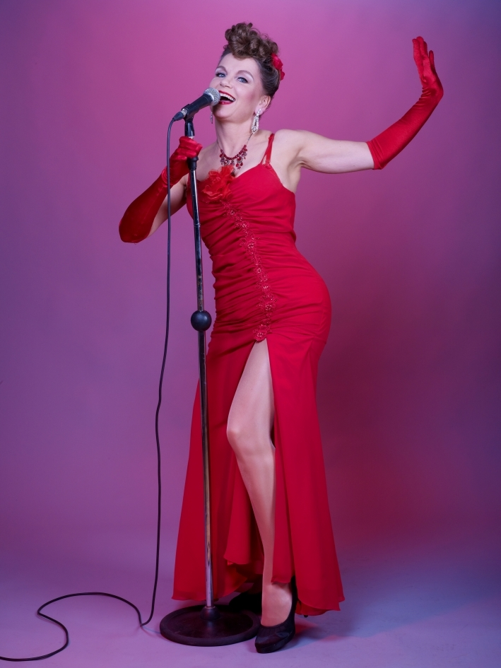 Julia Kempken fotografiert von Carl-Heinz Schanzenbach.